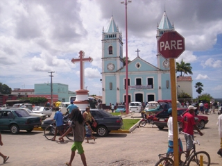 Município de São José do Mipibu